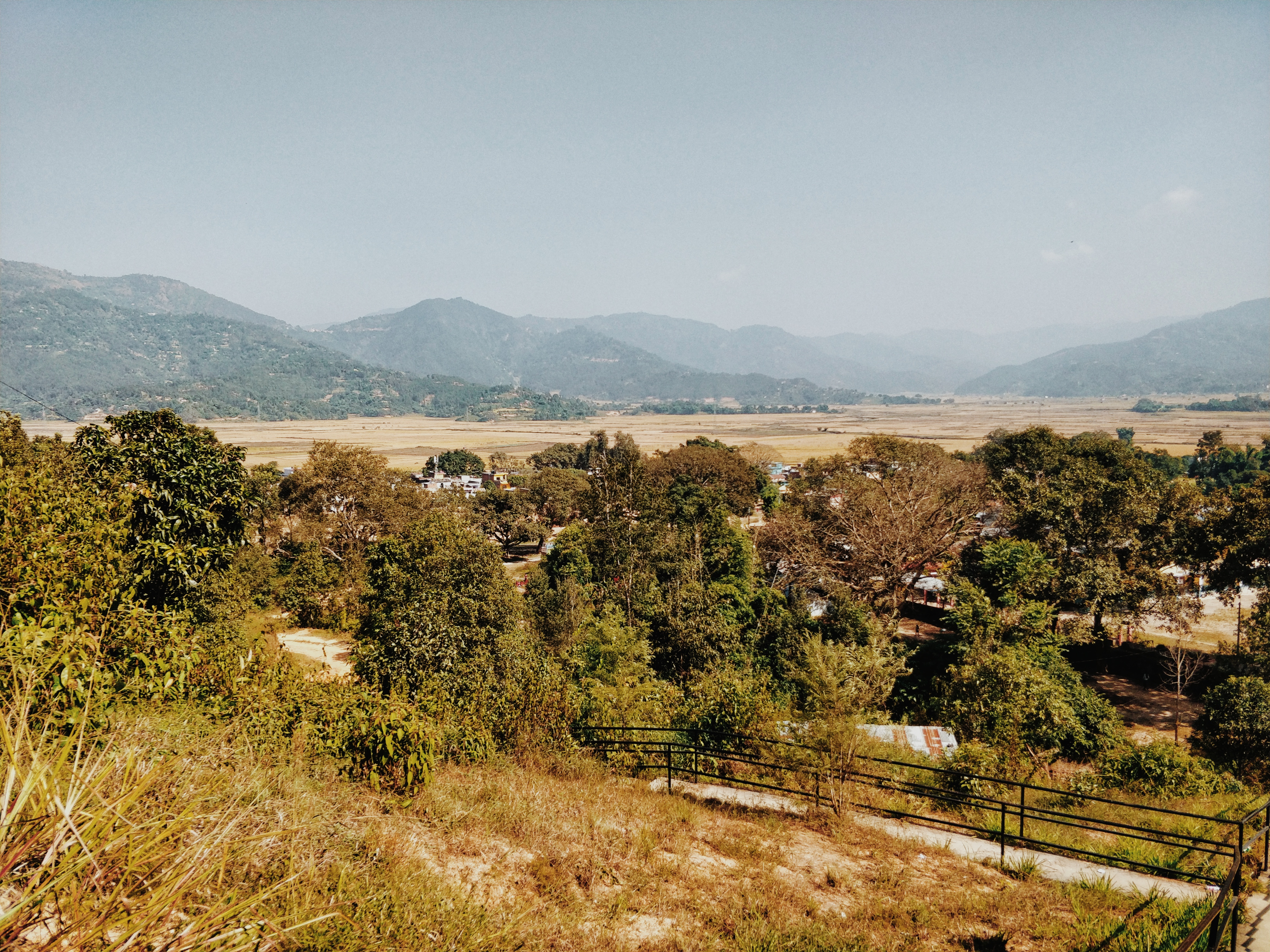 नेपाली: धान काटने समयमा पाल्पा माडीफाट र दमकडा बजार ।